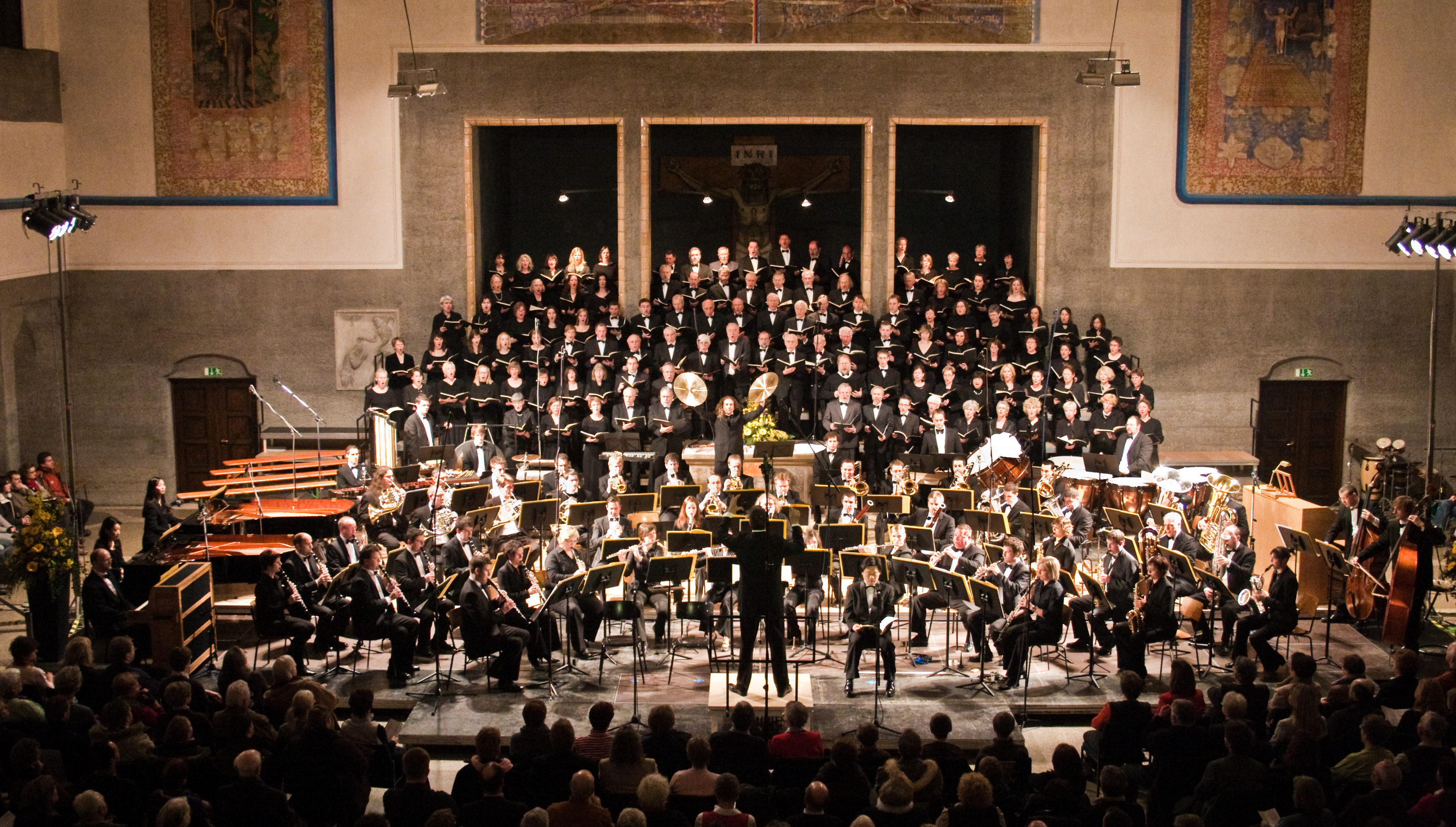 Pauluskirche in Ulm, Germany